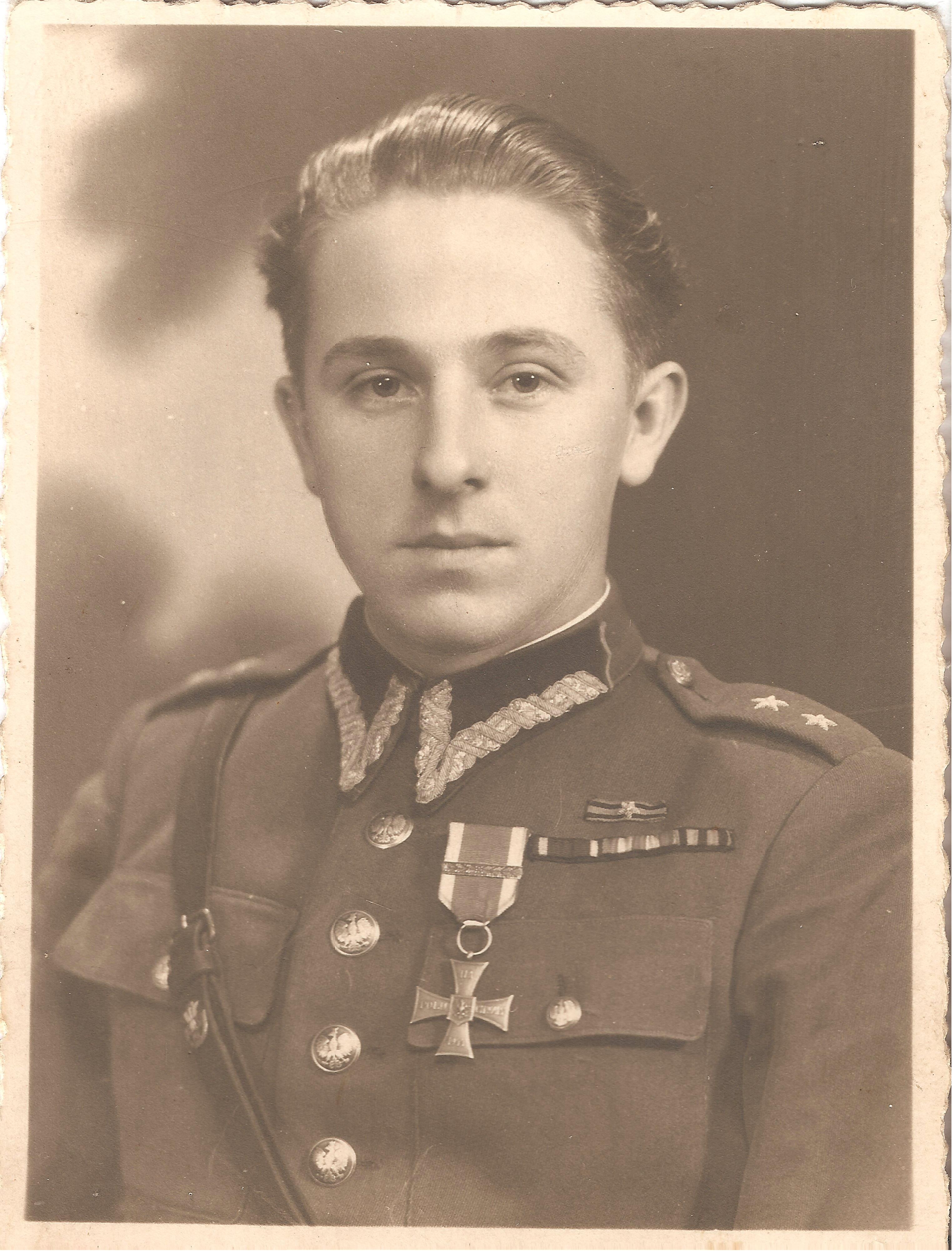 Tadeusz_Apoloniusz_Olejniczak